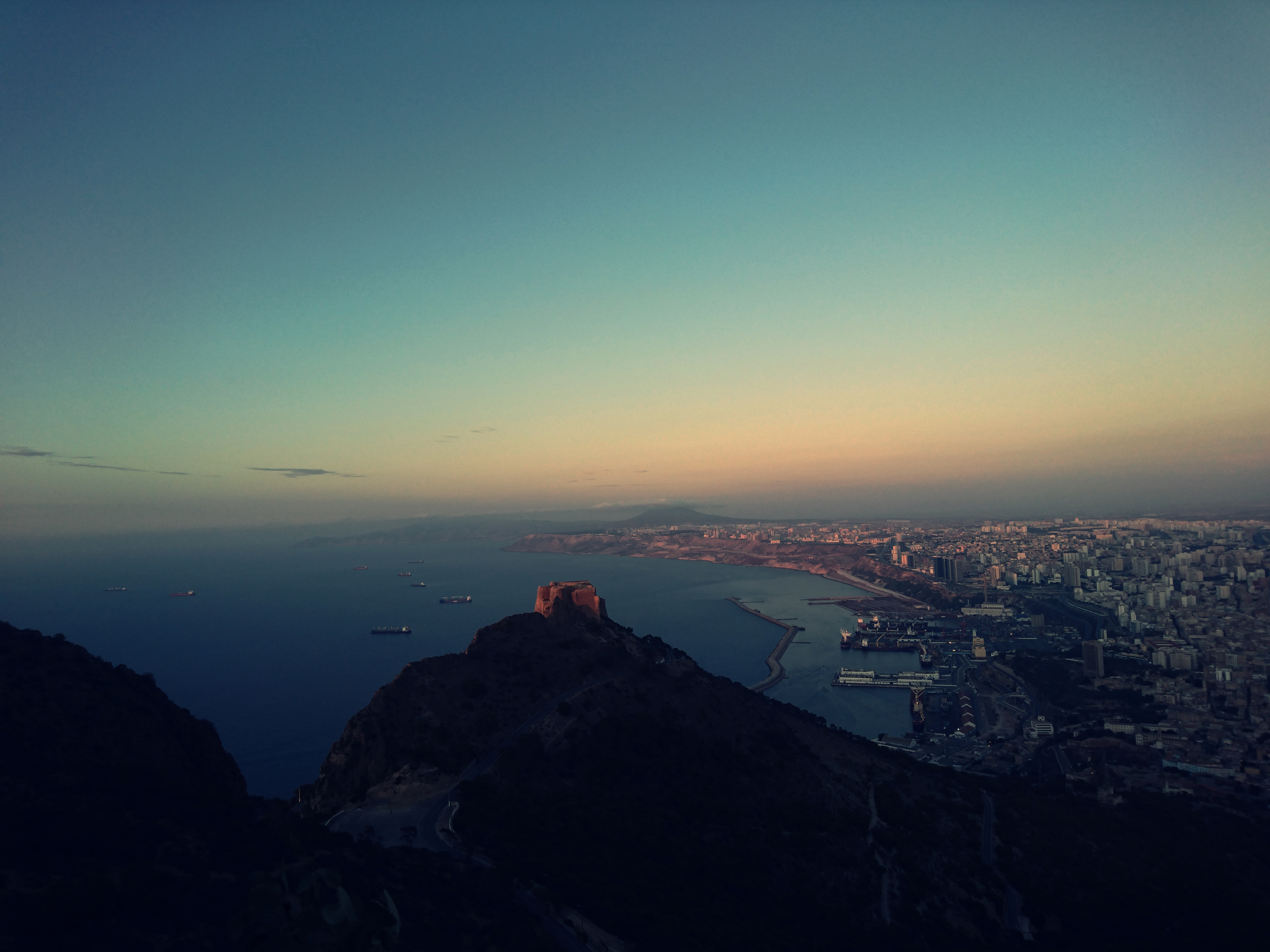 Contemplation depuis le Mausolée de Moulay sidi Abdelkader El Jilani, de la domination du fort santa cruz sur la ville d'Oran.